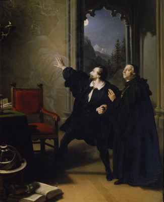 (nach Lord Byrons "Manfred")